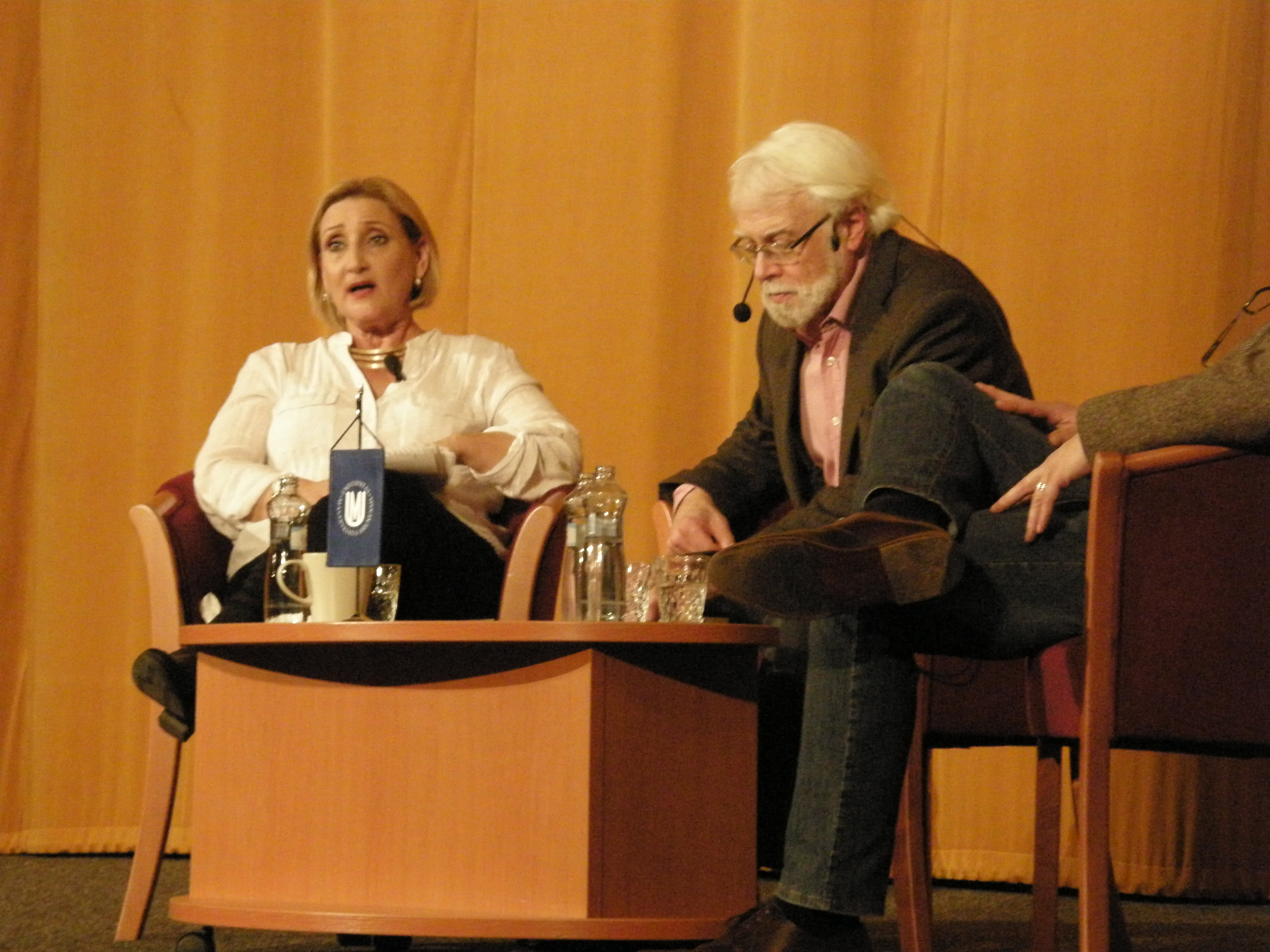 Beseda na téma Barbarství vs. humanita